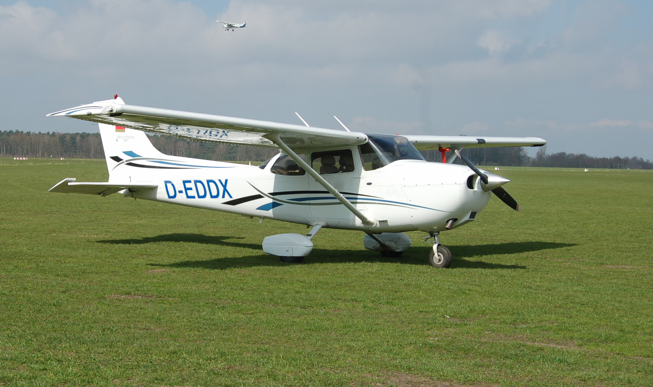 Cessna 172 Skyhawk (D-EDDX) auf dem Flugplatz Uetersen.